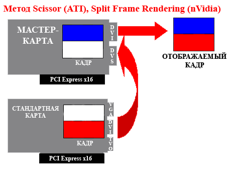 Алгоритм построения изображения в СrossFire